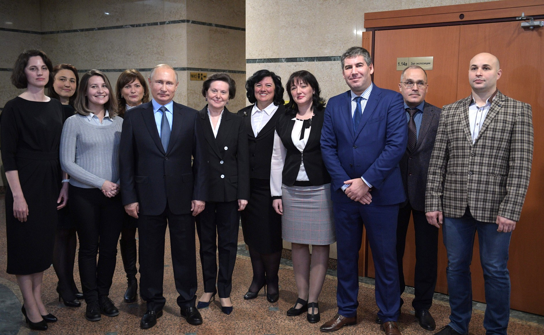 Владимир Путин посетил Музей природы и человека в ходе рабочей поездки в Уральский федеральный округ. С сотрудниками учреждения.